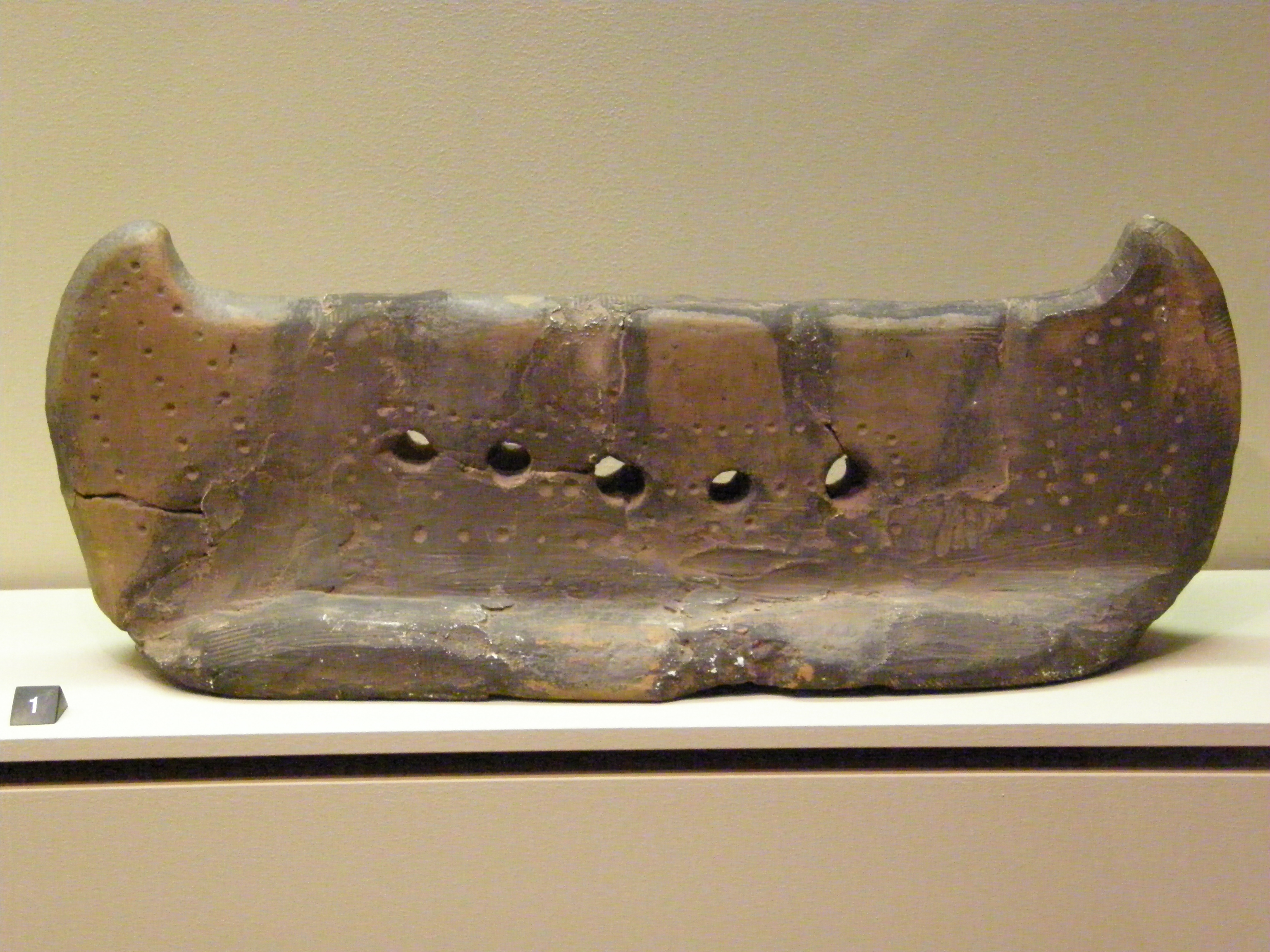 Photo d'un chenet, site du Hohlandsberg, 1300-750 av. J.-C. (Musée d'Unterlinden, Colmar, France).